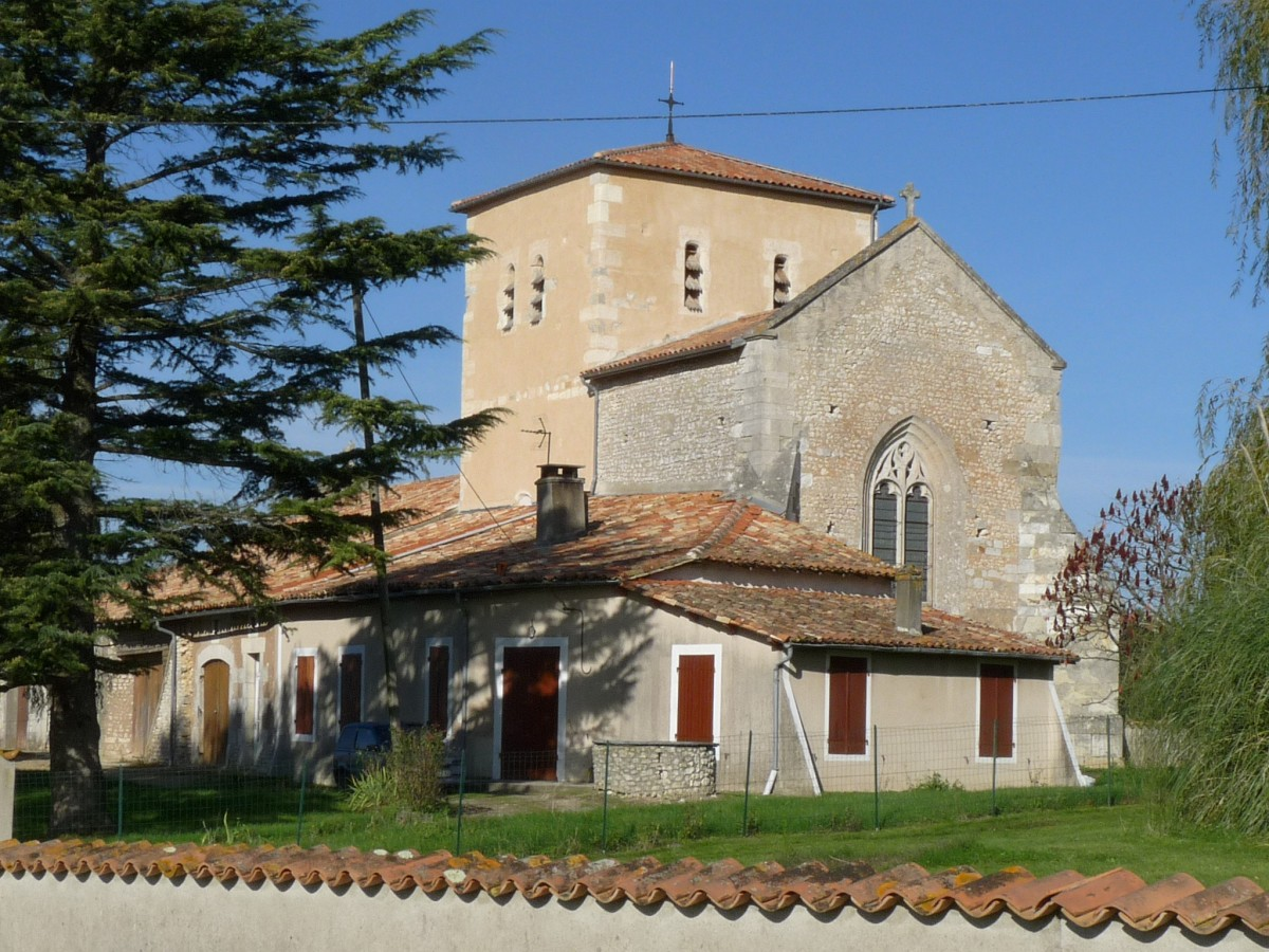 église de Ste-Colombe, Charente-Maritime, France